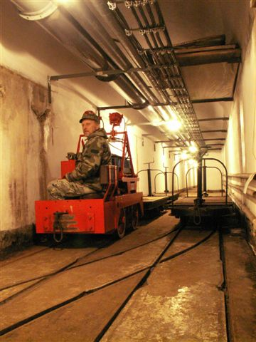 Hlavní (dělostřelecká) galerie v dělostřelecké tvrzi Hůrka s akumulátorovou lokomotivou